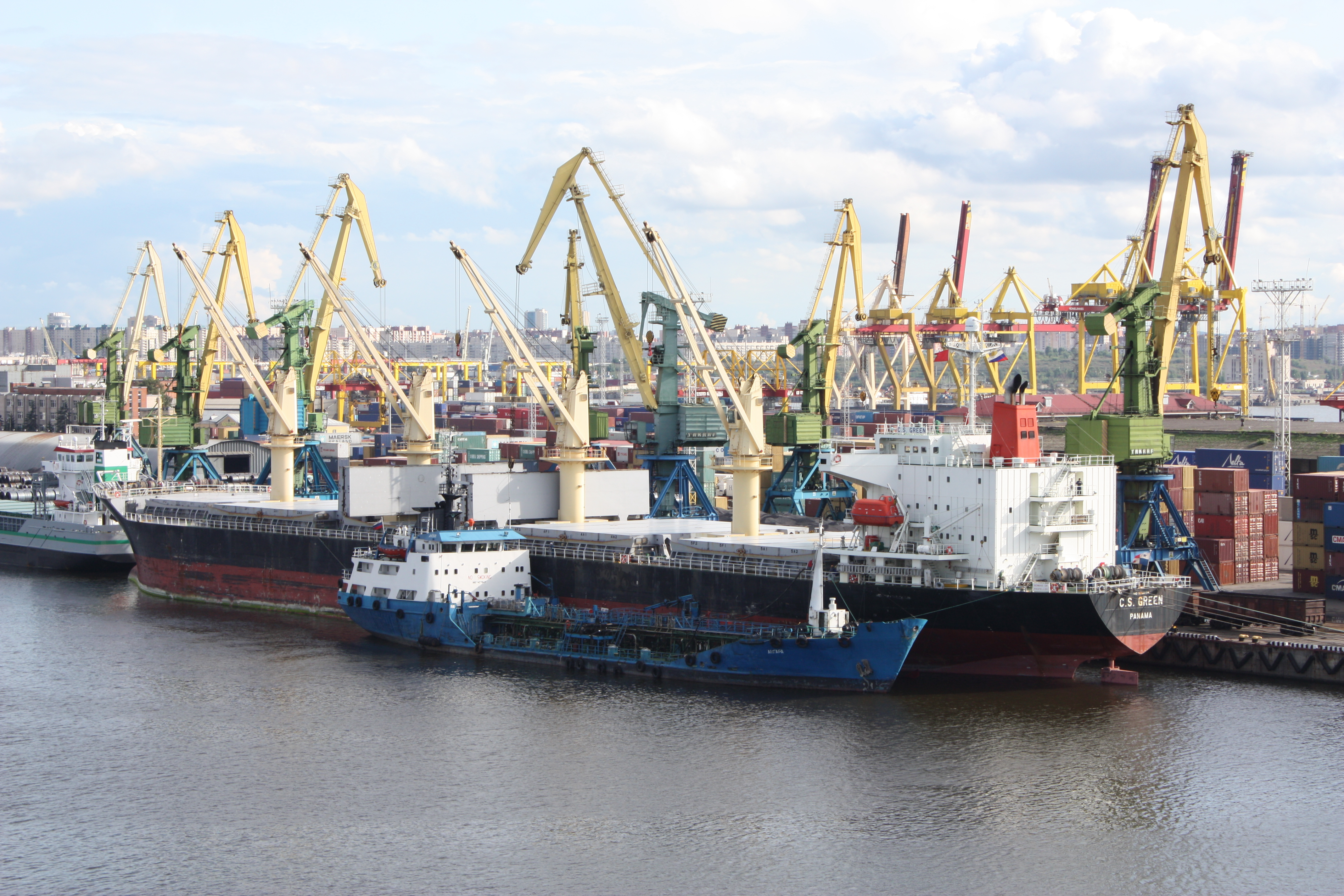 Port of Sain Petersburg Russia 2009